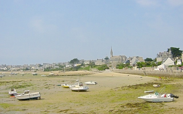 Porz Kernog auf der Ile de Batz, vom Hafen aus fotografiert.